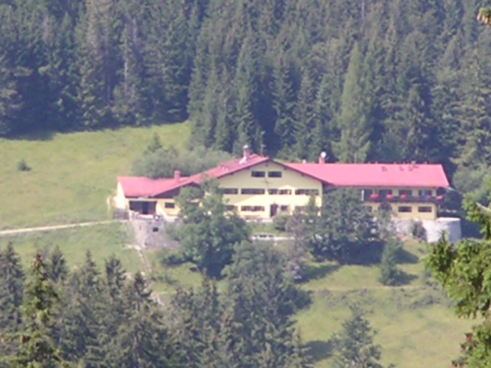 Blick vom Oberen Sudelfeld auf das SS-Berghaus (heute Jugendherberge) in Bayrischzell, Landkreis Miesbach, Bayern. Als Baudenkmal unter Aktennummer D-1-82-112-68 in der Bayerischen Denkmalliste aufgeführt. Laut Denkmalliste im Jahr 1938 erbaut.